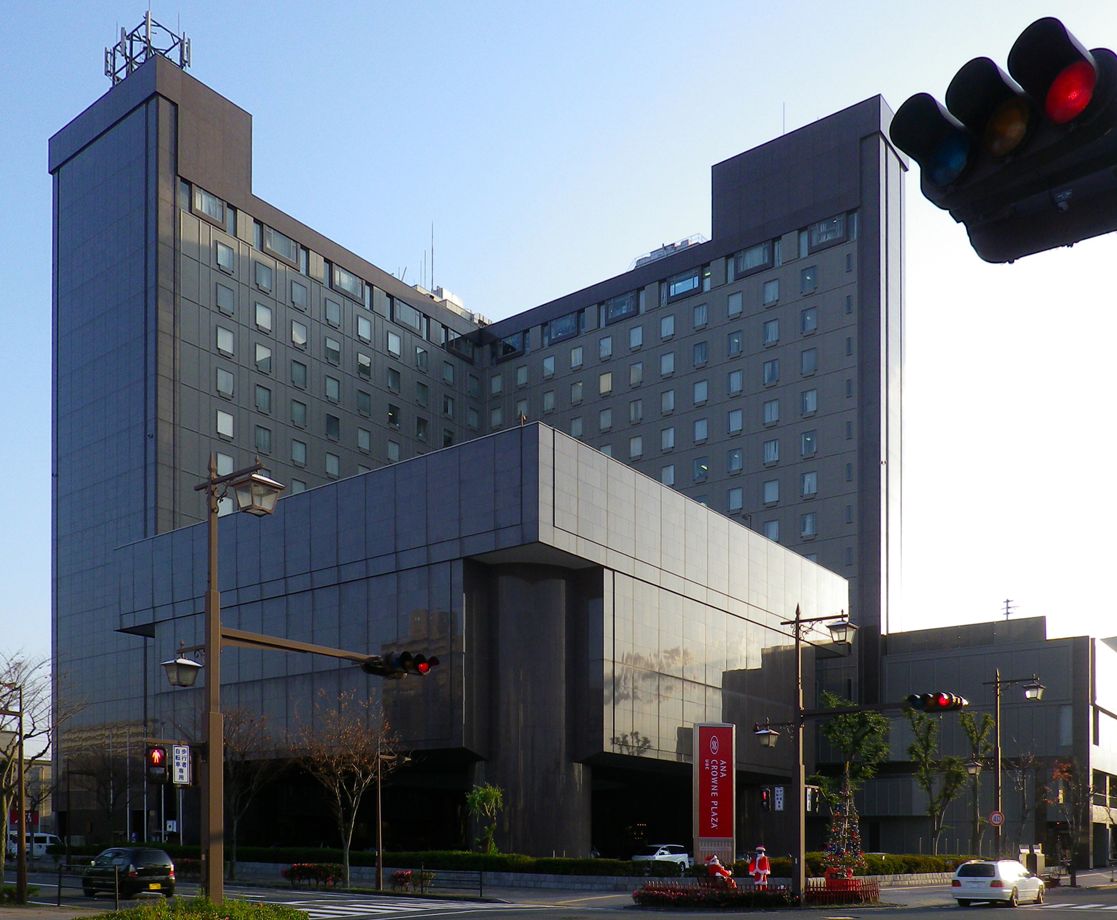 ANAクラウンプラザホテル宇部。宇部興産ビル。